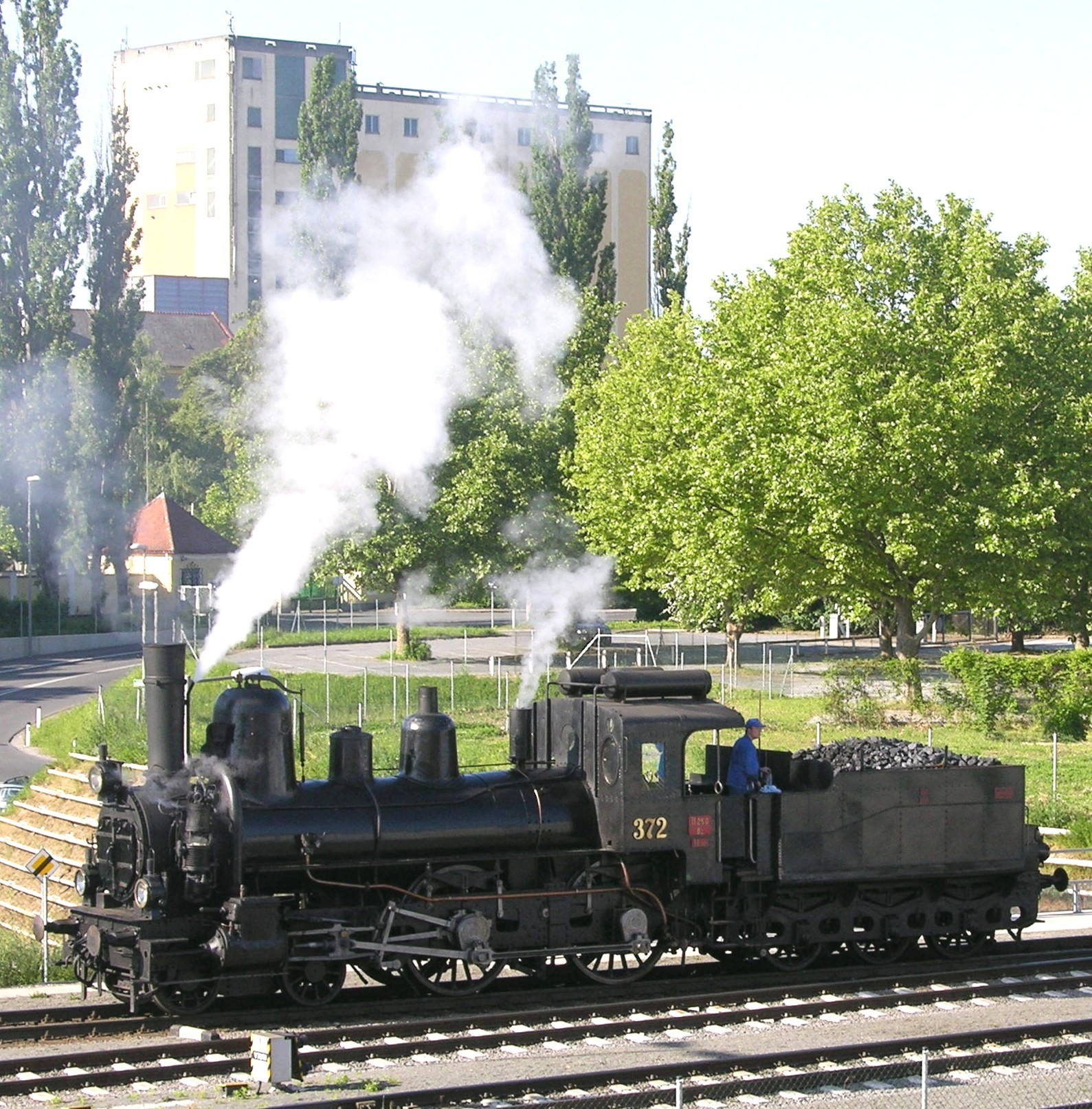 Dampflokomotive SB 17c372